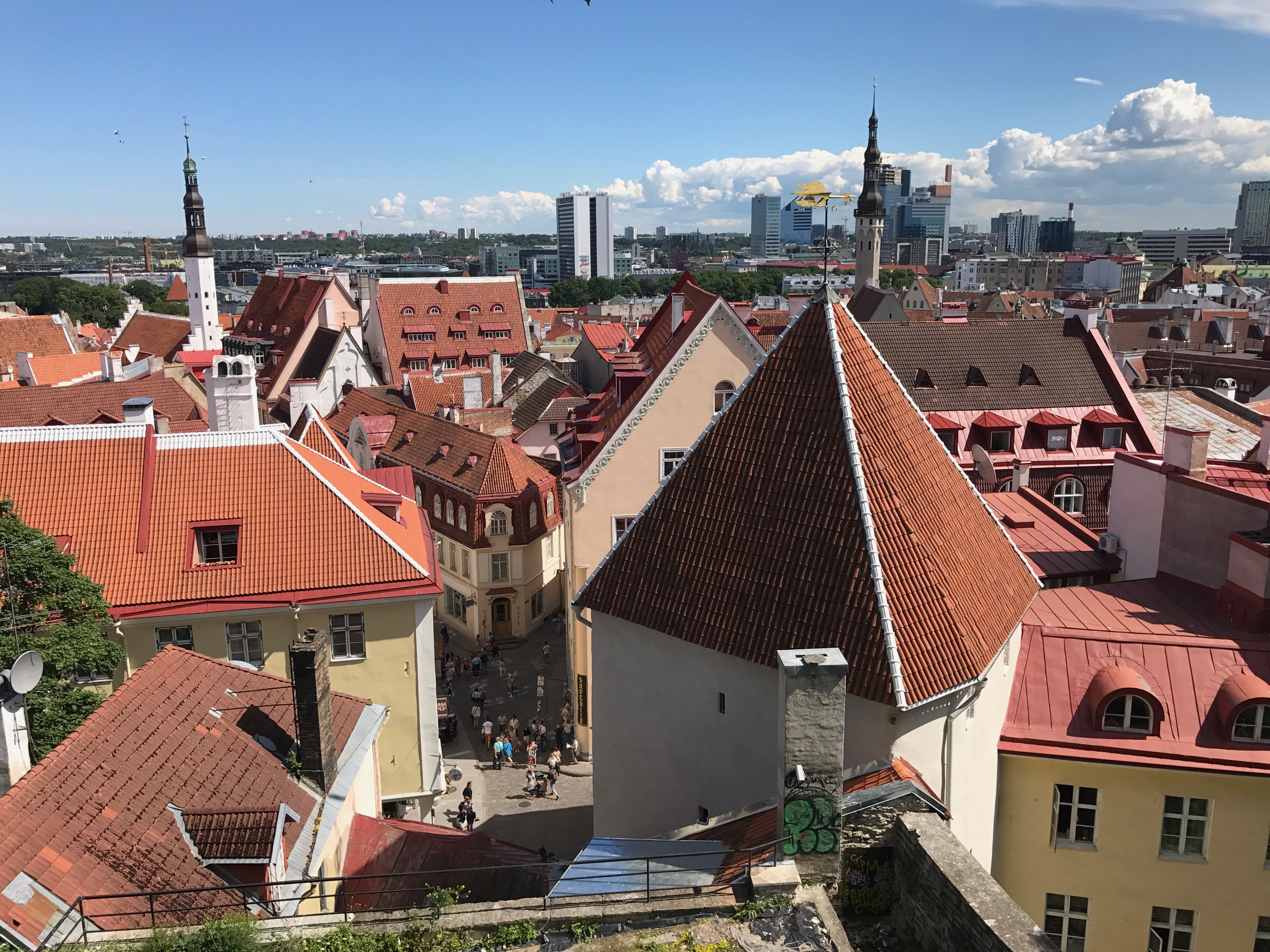 Старый Таллин